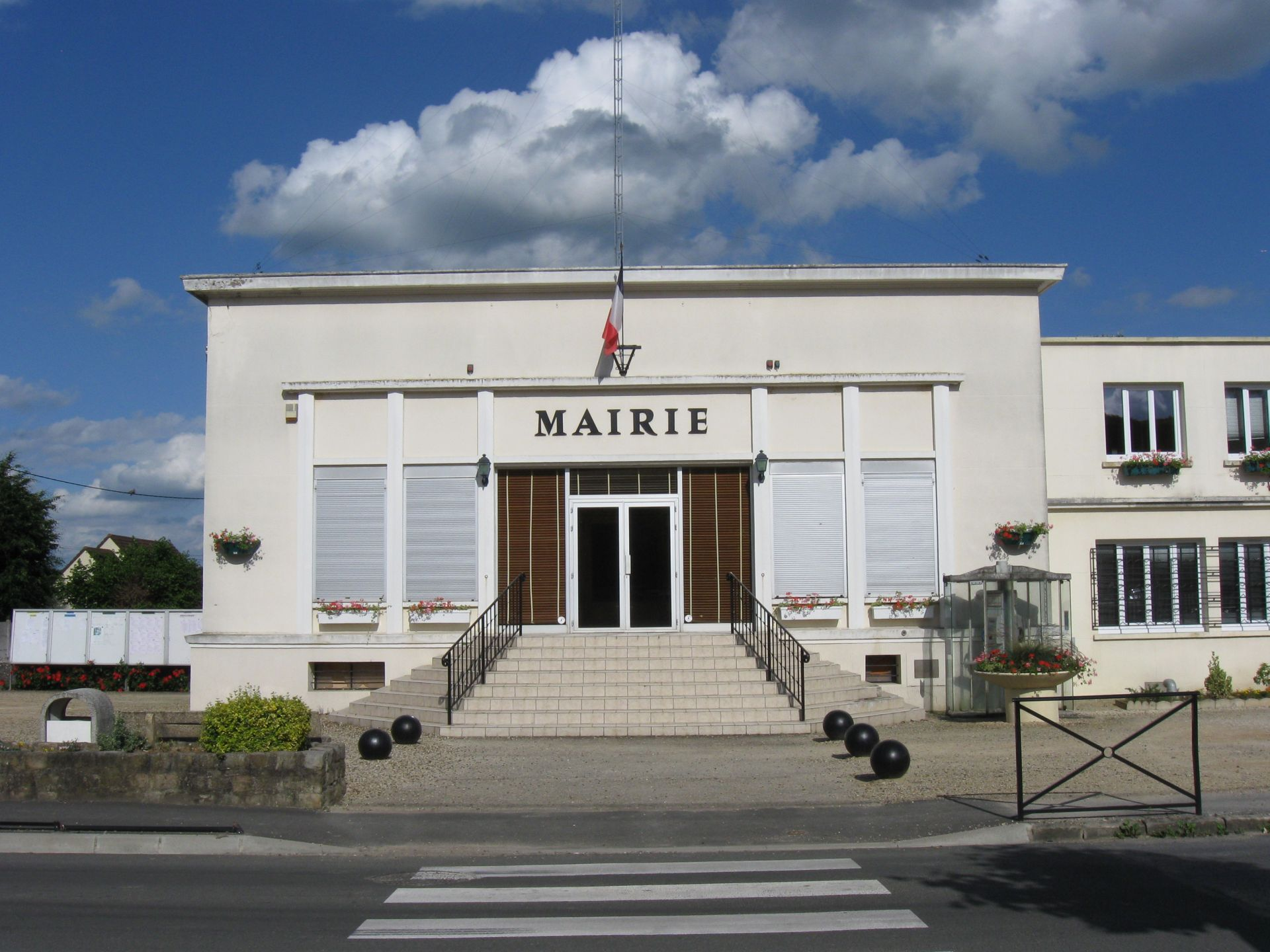 Mairie de Mareuil-sur-Ourcq. (Oise, Picardie).